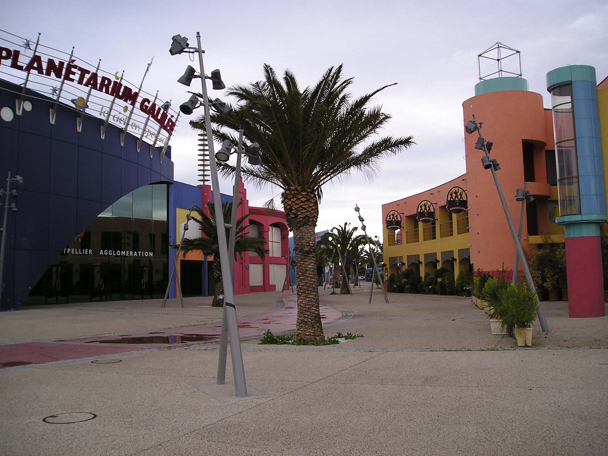 L'allée Ulysse dans le quartier Odysseum, à Montpellier. Au fond, la station Odysseum de la ligne 1 du tramway de Montpellier.